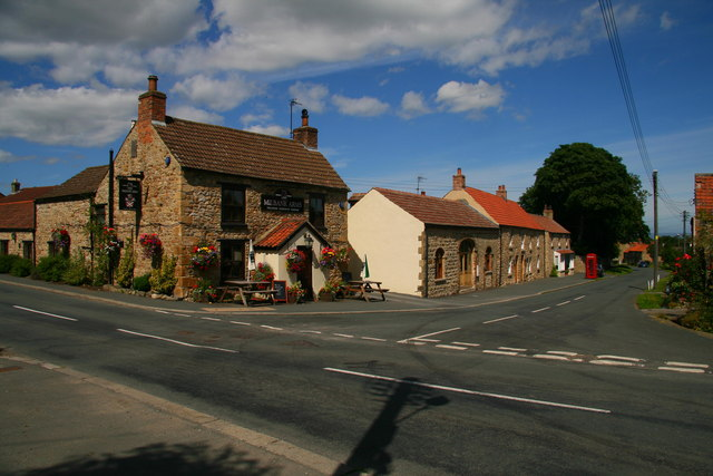 Well Village